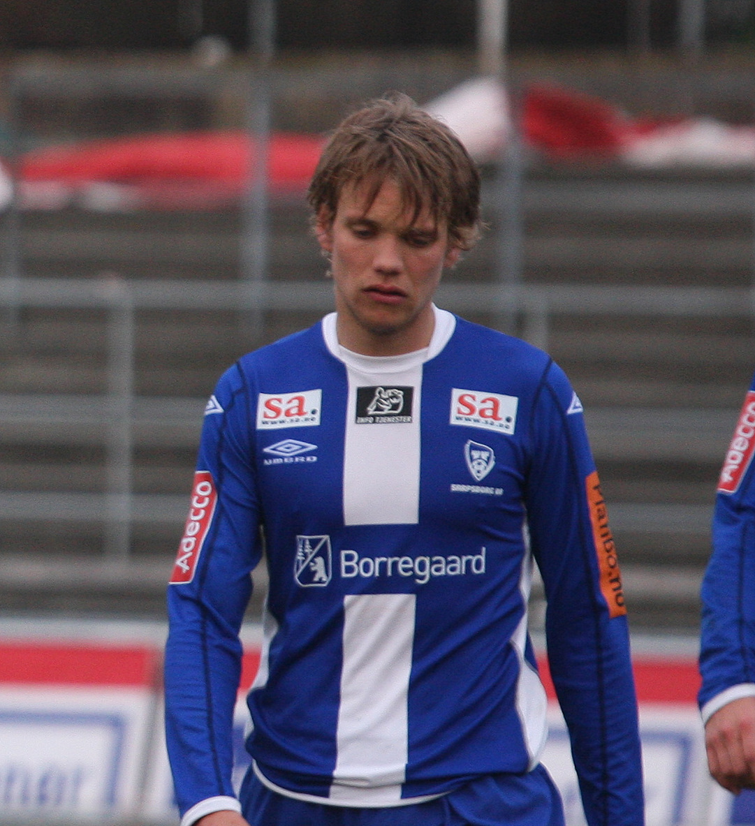 Ole Jørgen Halvorsen, Sarpsborg 08